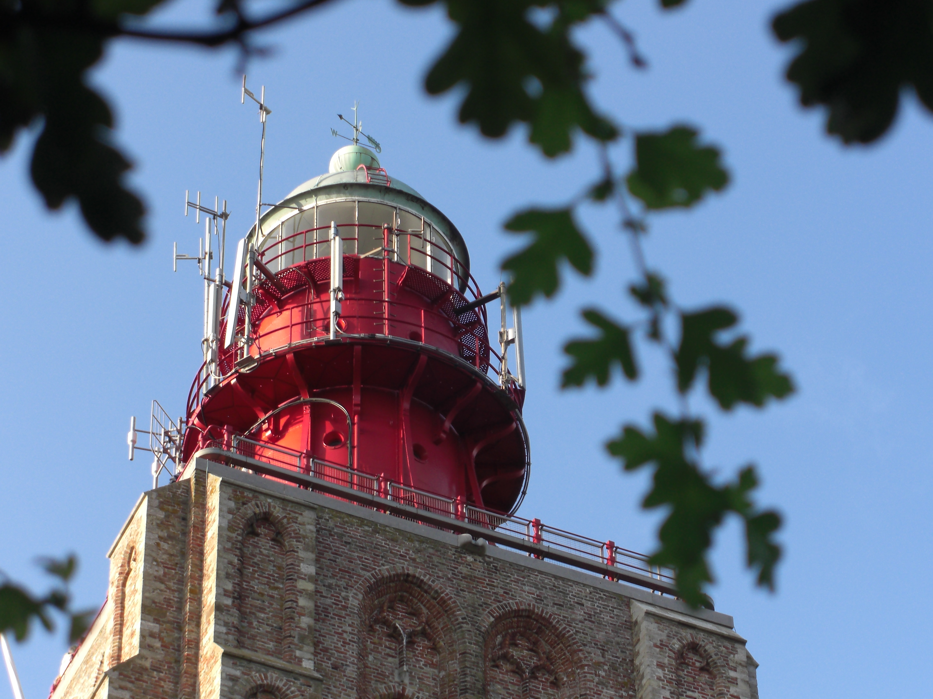 Optiek van de toren